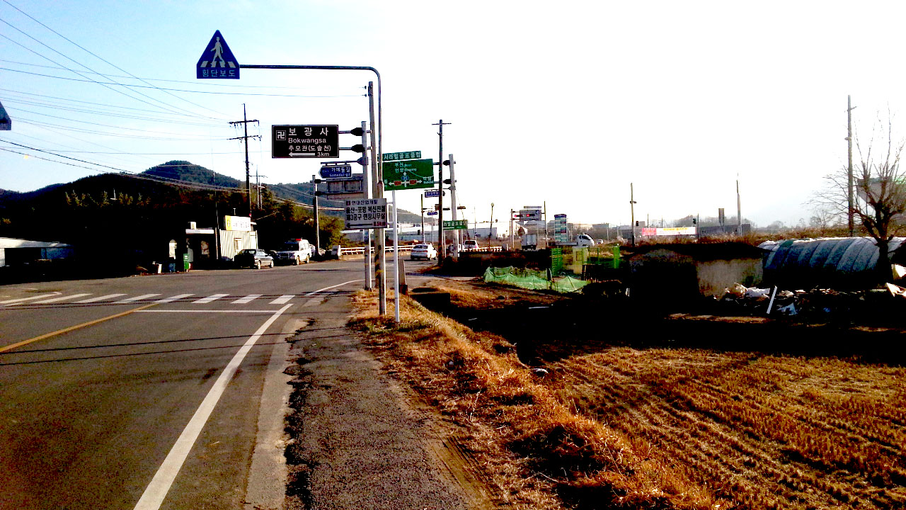 경상북도 경주시 내남면 이조리 686-3 (남쪽 방향)